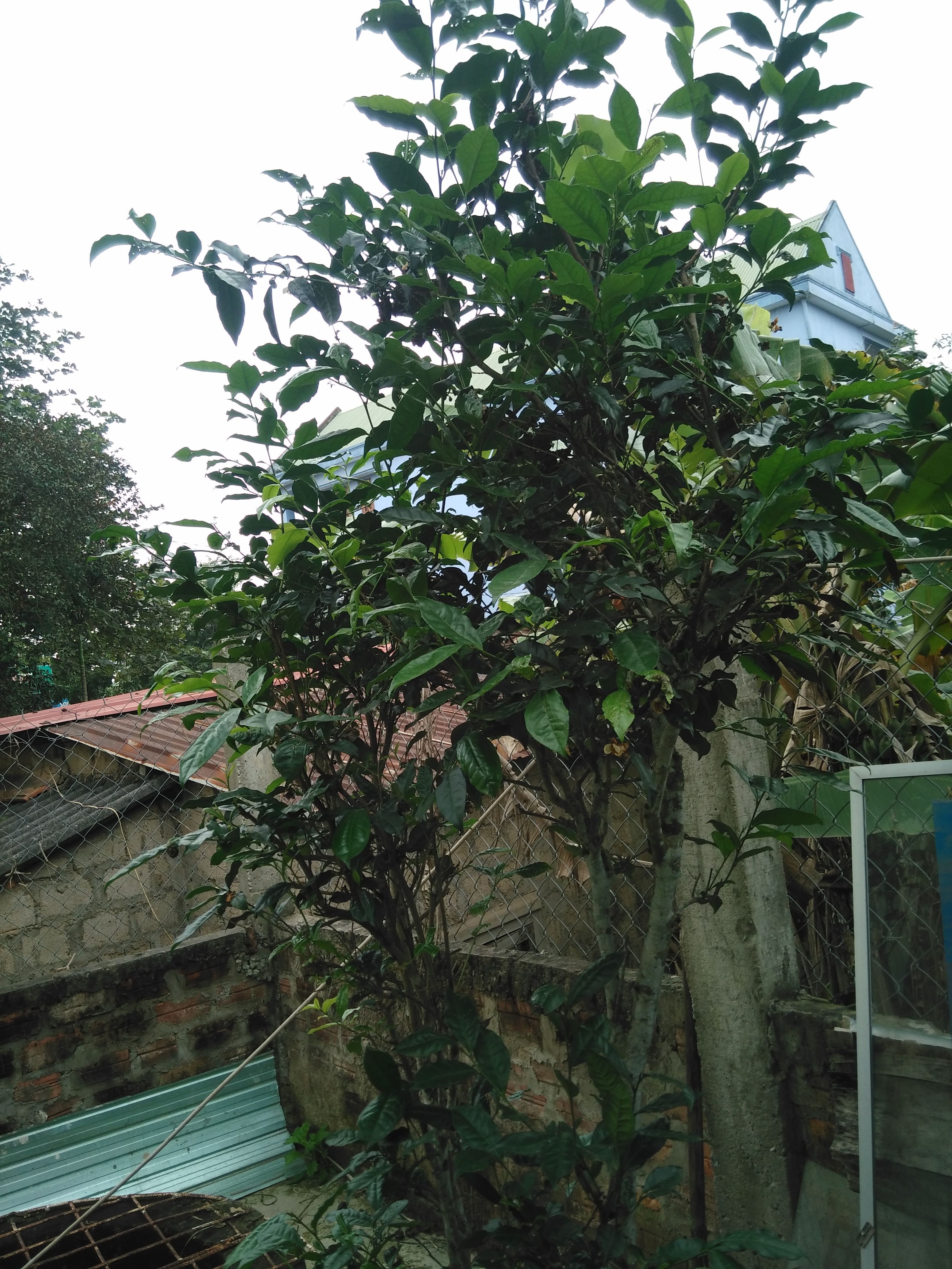 Cây chè thuộc giống chè Cam Lộc (chè Cùa), đặc sản của vùng Cùa thuộc Cam Lộ, Quảng Trị